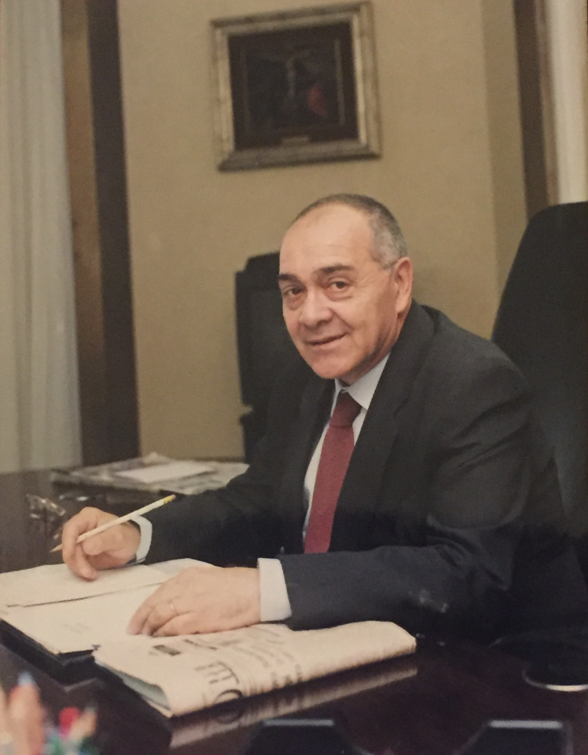 in occasione della nomina di presidente di Caripuglia